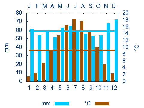 Klimadiagramm